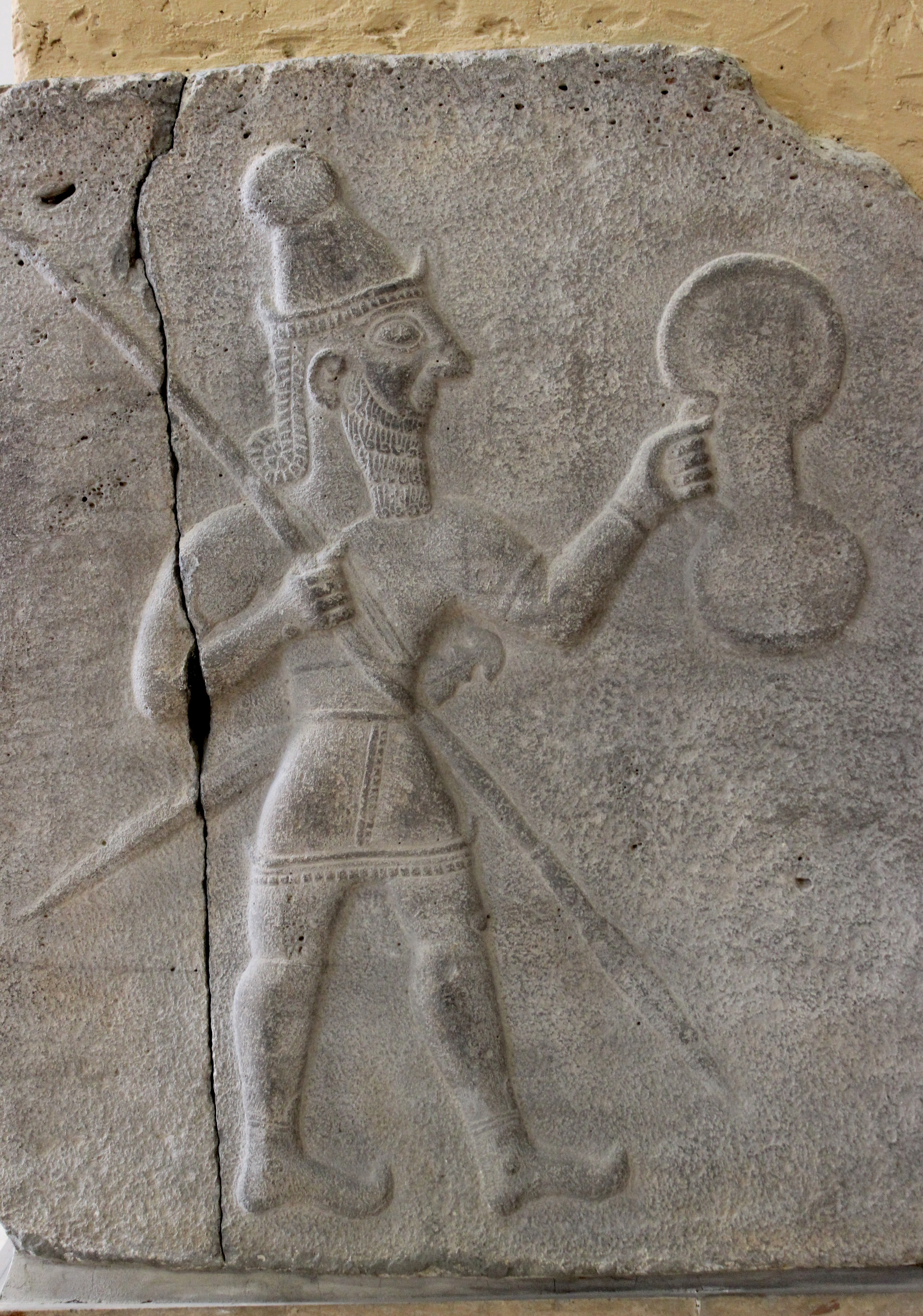 Berlín, Vorderasiatisches Museum. Arte hitita procedente de Sam'al.